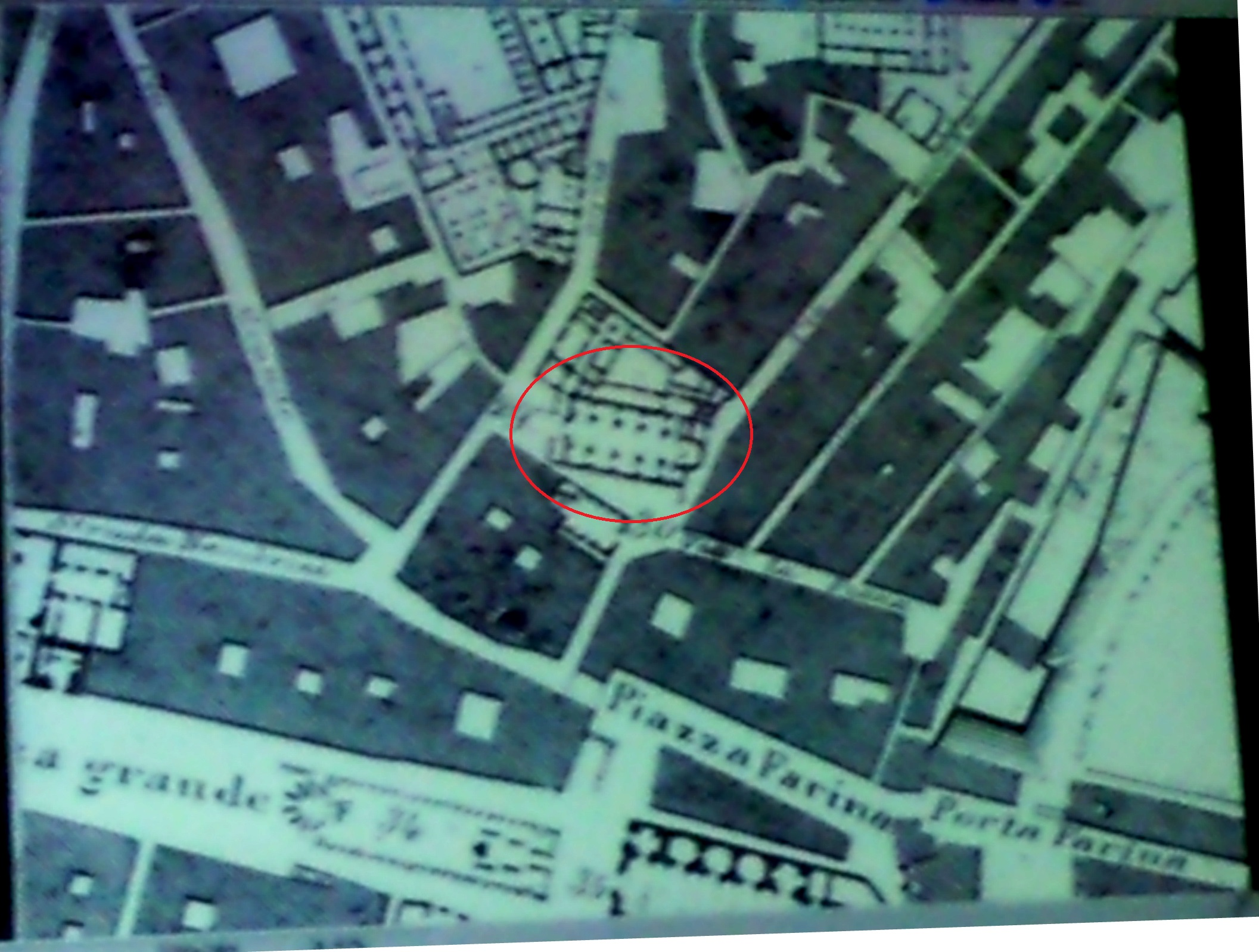 PLANIMETRIA UBICAZIONE CHIESA DI SAN PIETRO (ANCONA)